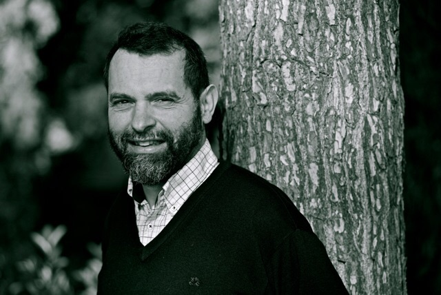 Javier Melloni